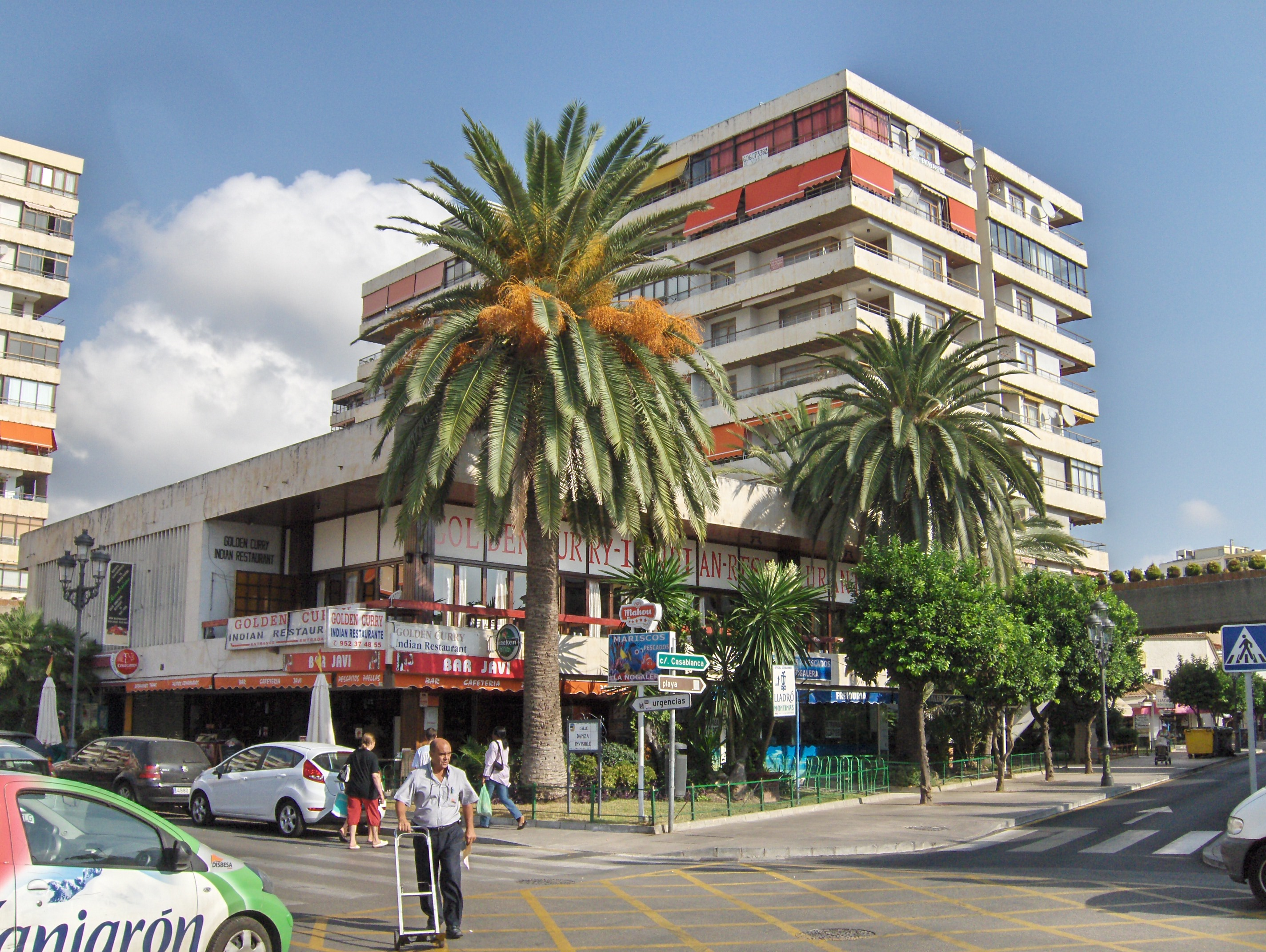 La Nogalera (1963), Torremolinos, obra de Antonio Lamela Martínez